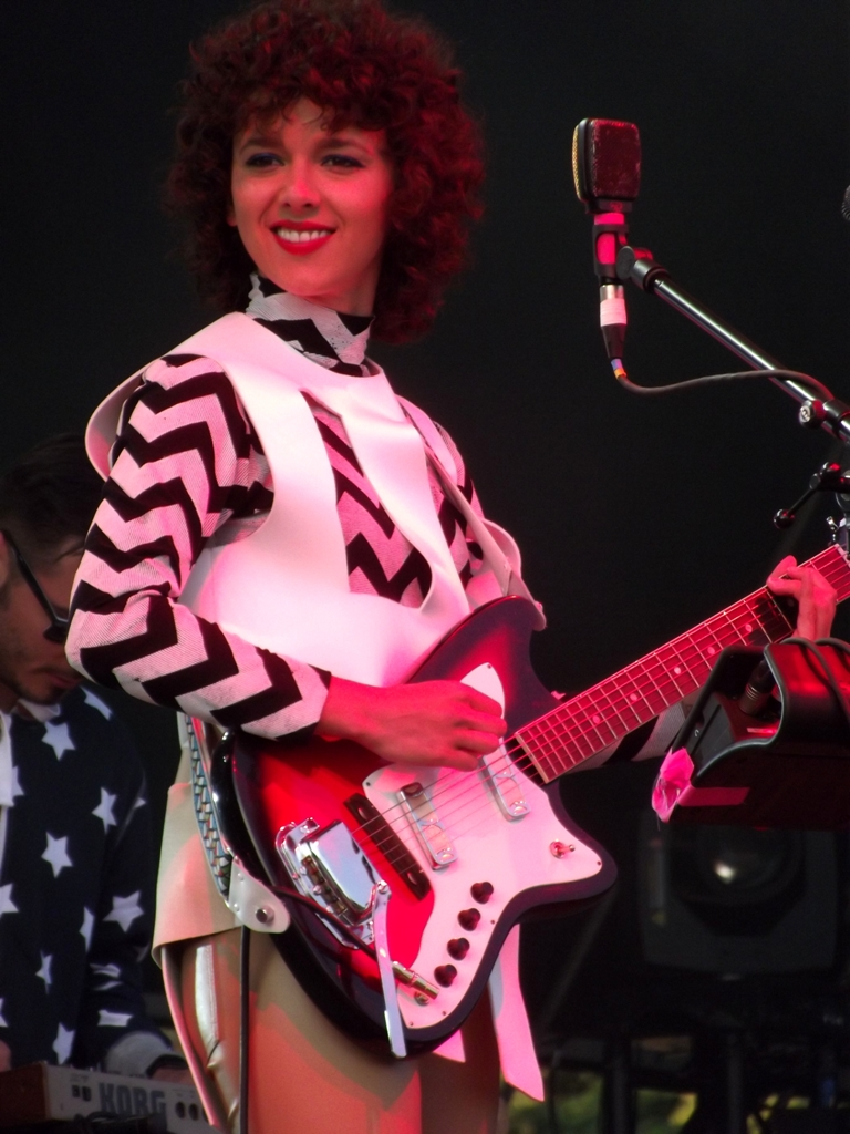 Zdjęcie zrobione podczas drugiego dnia Life Festivalu 2013 w Oświęcimiu.